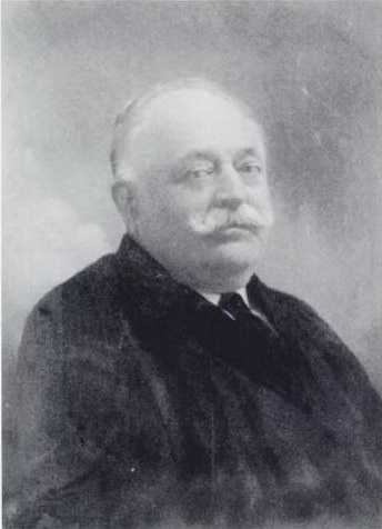 Retrat d'Avel·lí Trinxet i Casas, propietari de la fàbrica "Can Trinxet" (l'Hospitalet de Llobregat, Catalunya) i de la casa Trinxet (Barcelona), obra de Josep Puig i Cadafalch, destruïda el 1967.